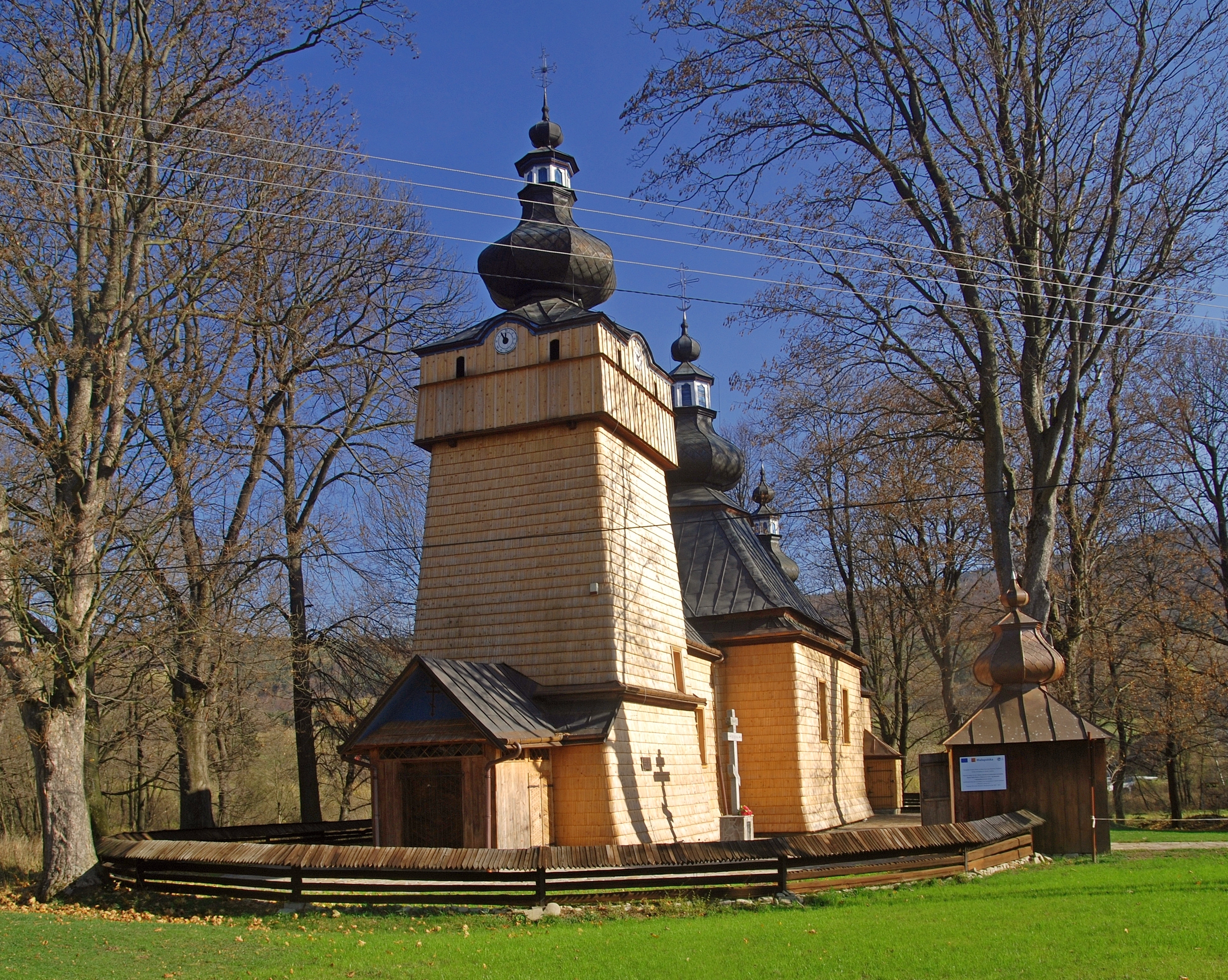 wieś Hańczowa